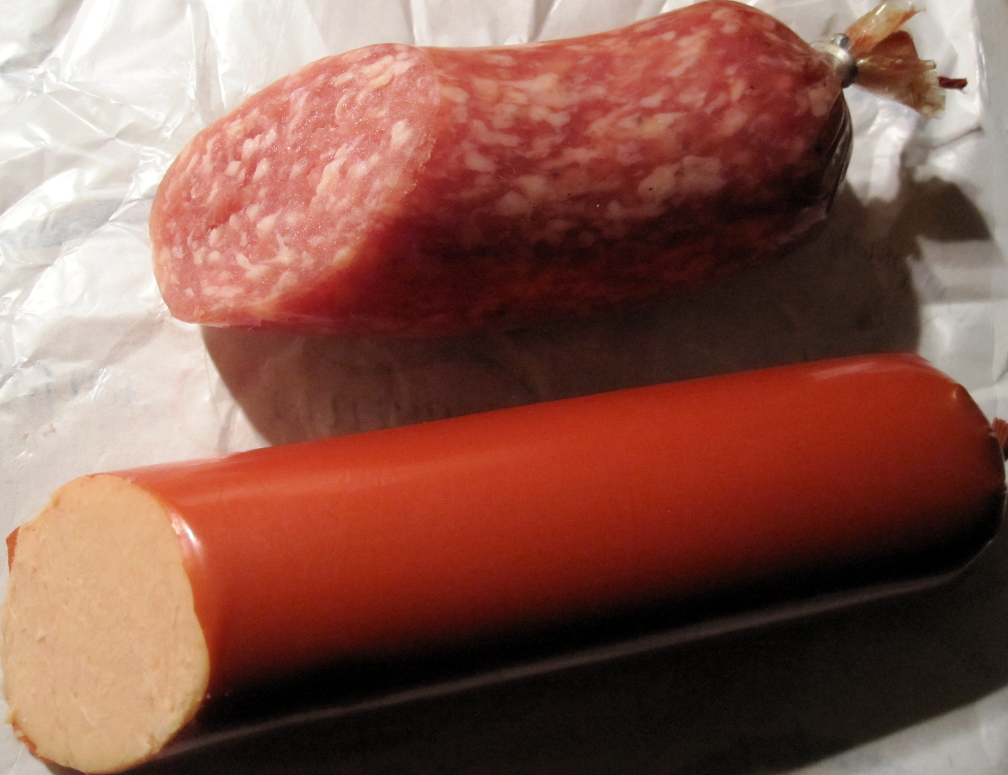 Mettwürste